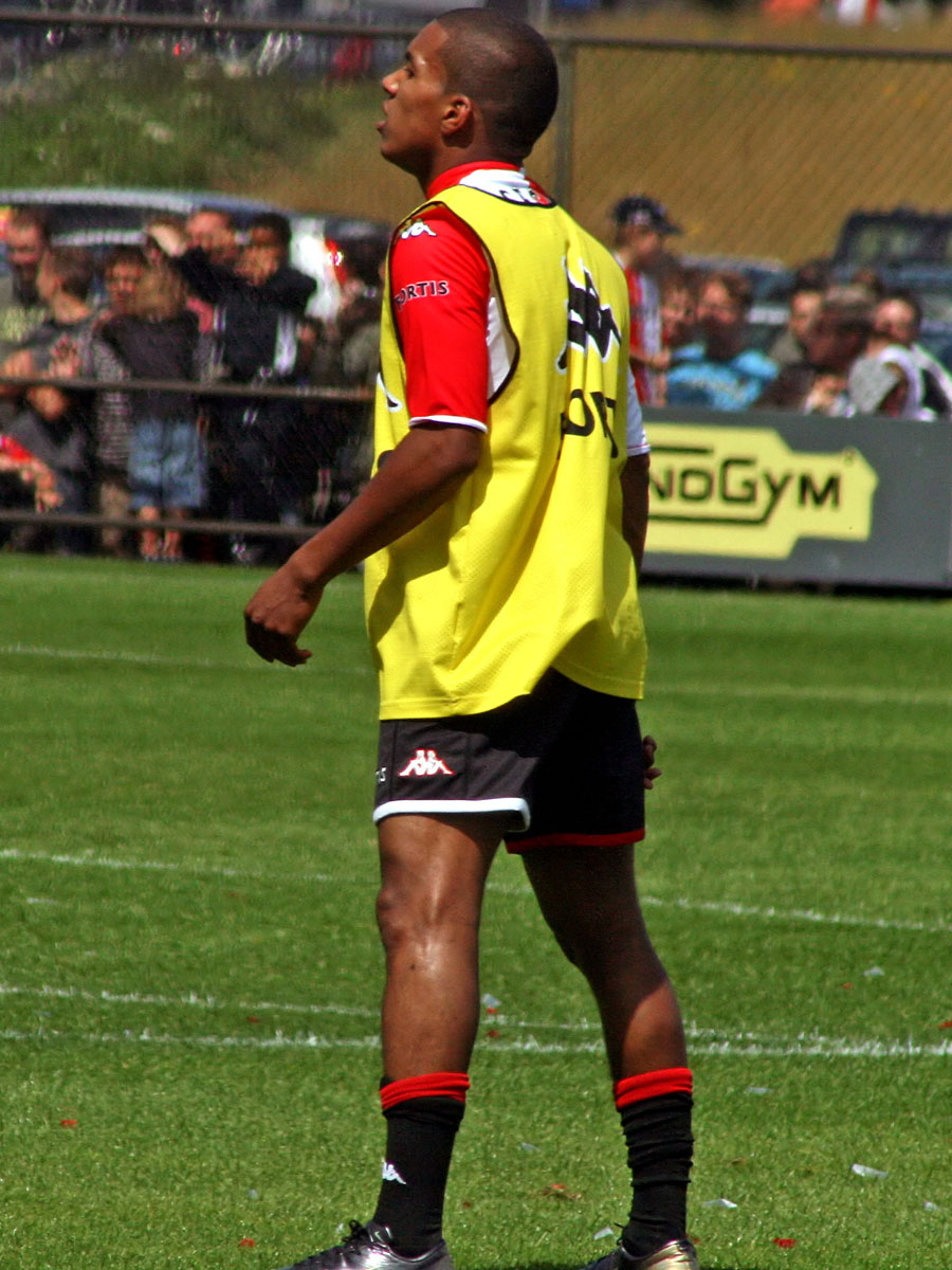 Diego Biseswar (Feyenoord)